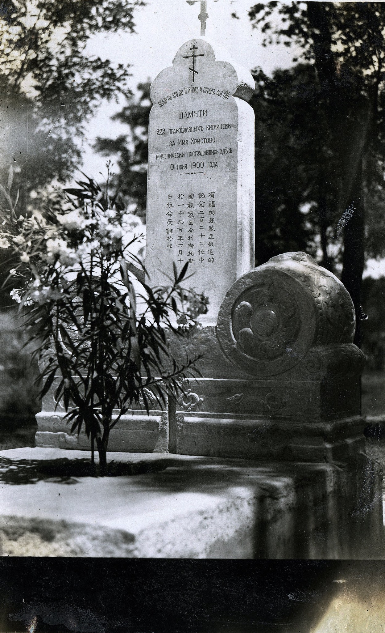 Памятник над колодцем, в который боксёрами были брошены тела убитых православных китайцев